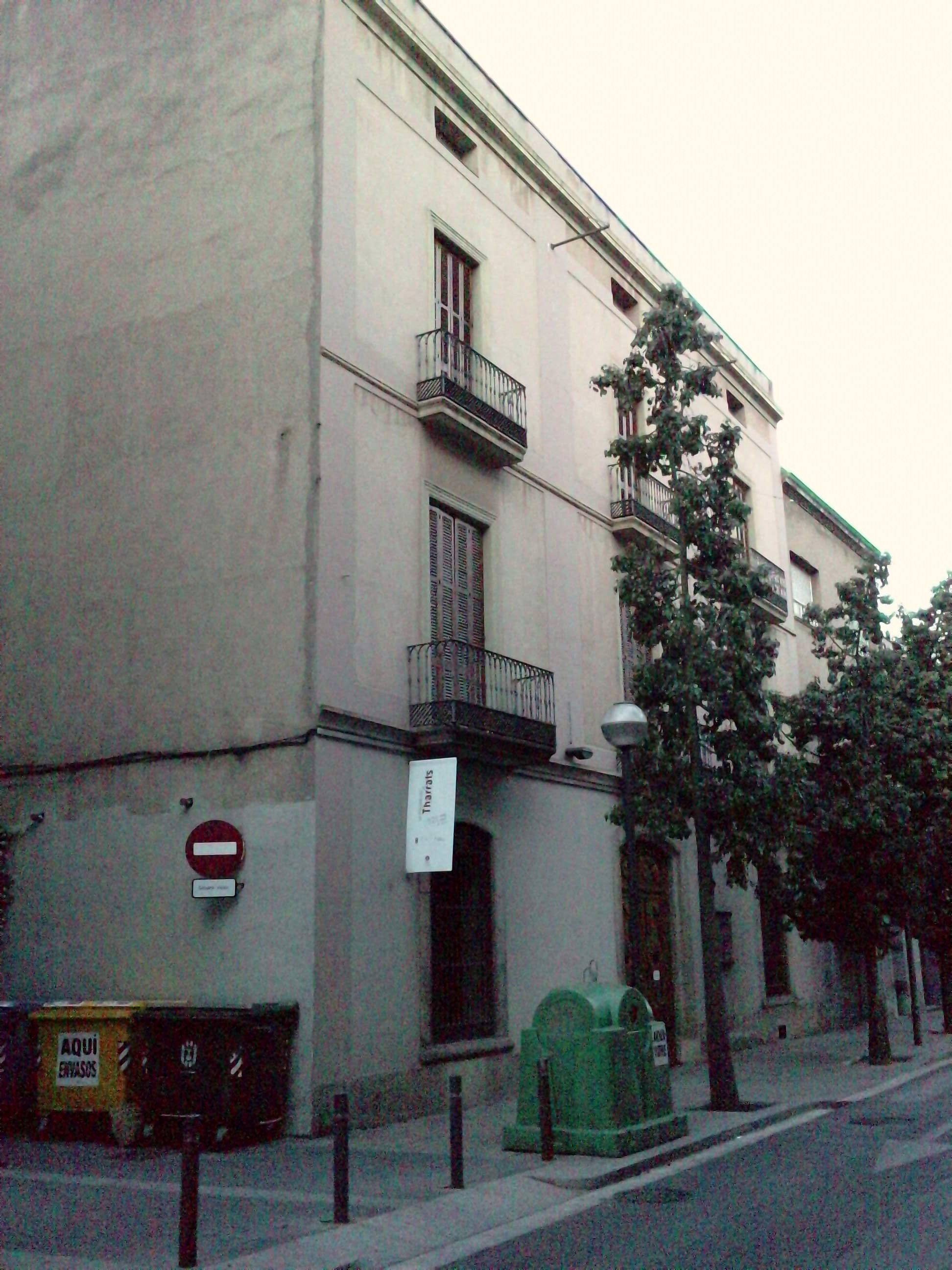 Museu d'Art de Sabadell